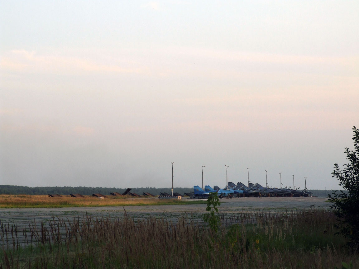 Авиабаза Саваслейка